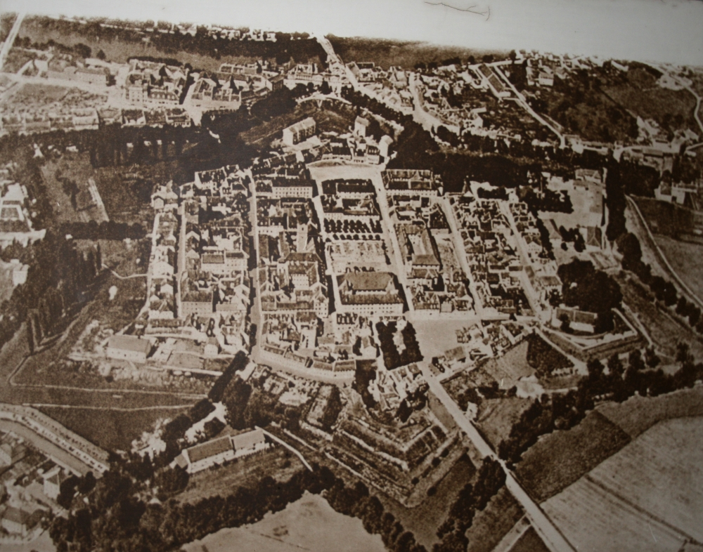 snimljeno tijekom Noći muzeja u Etnografskom muzeju u Zagrebu